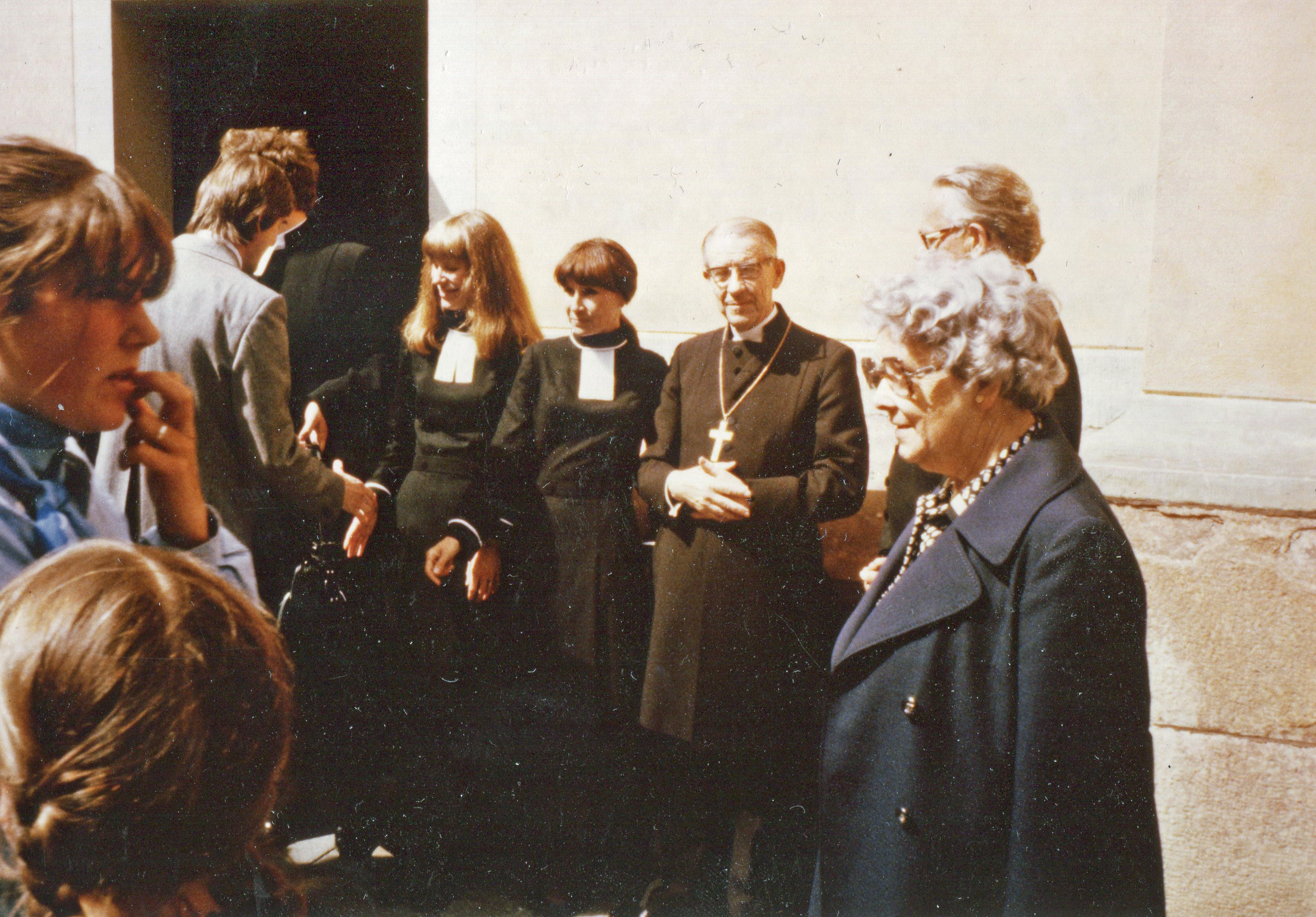 Från vänster: Kerstin Billinger, Barbro Ulfvarson, biskoop Ingmar Ström, direktor Gösta Wrede m hustru